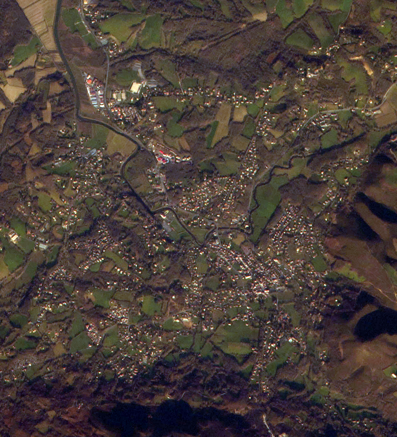 Azkaine, Nazioarteko Espazio Estaziotik ikusia.